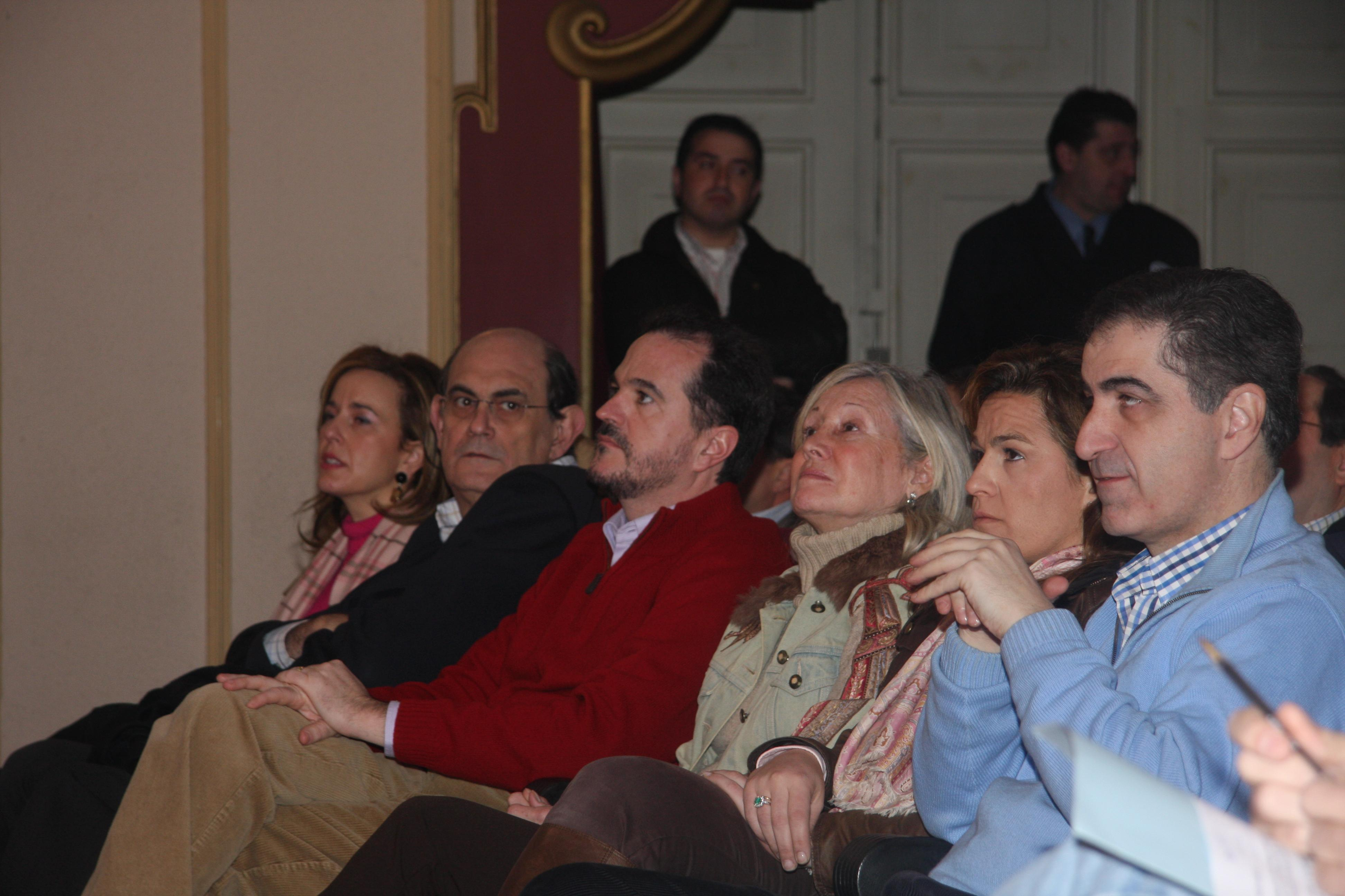 Carlos Iturgaiz en un mitin del PP en Las Arenas (2009-II-8)